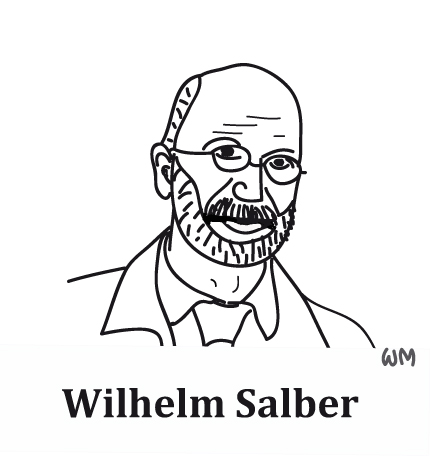 Salber Portrait gezeichnet